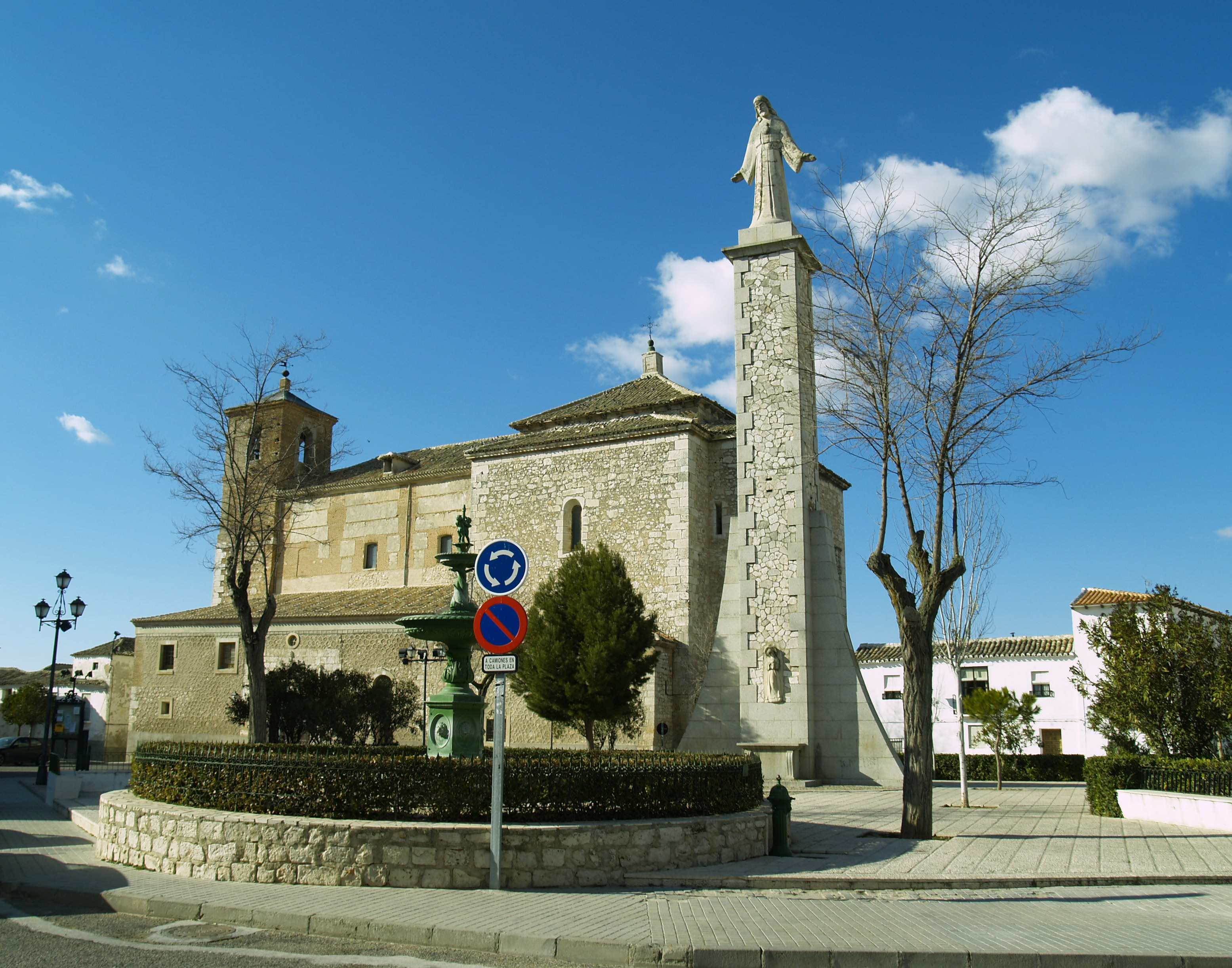 Hiszpania, Kastylia-La Mancha, Toledo, Stół Okani (Mesa de Ocańa), Ocaña, Kościół Najświętszej Marii Panny